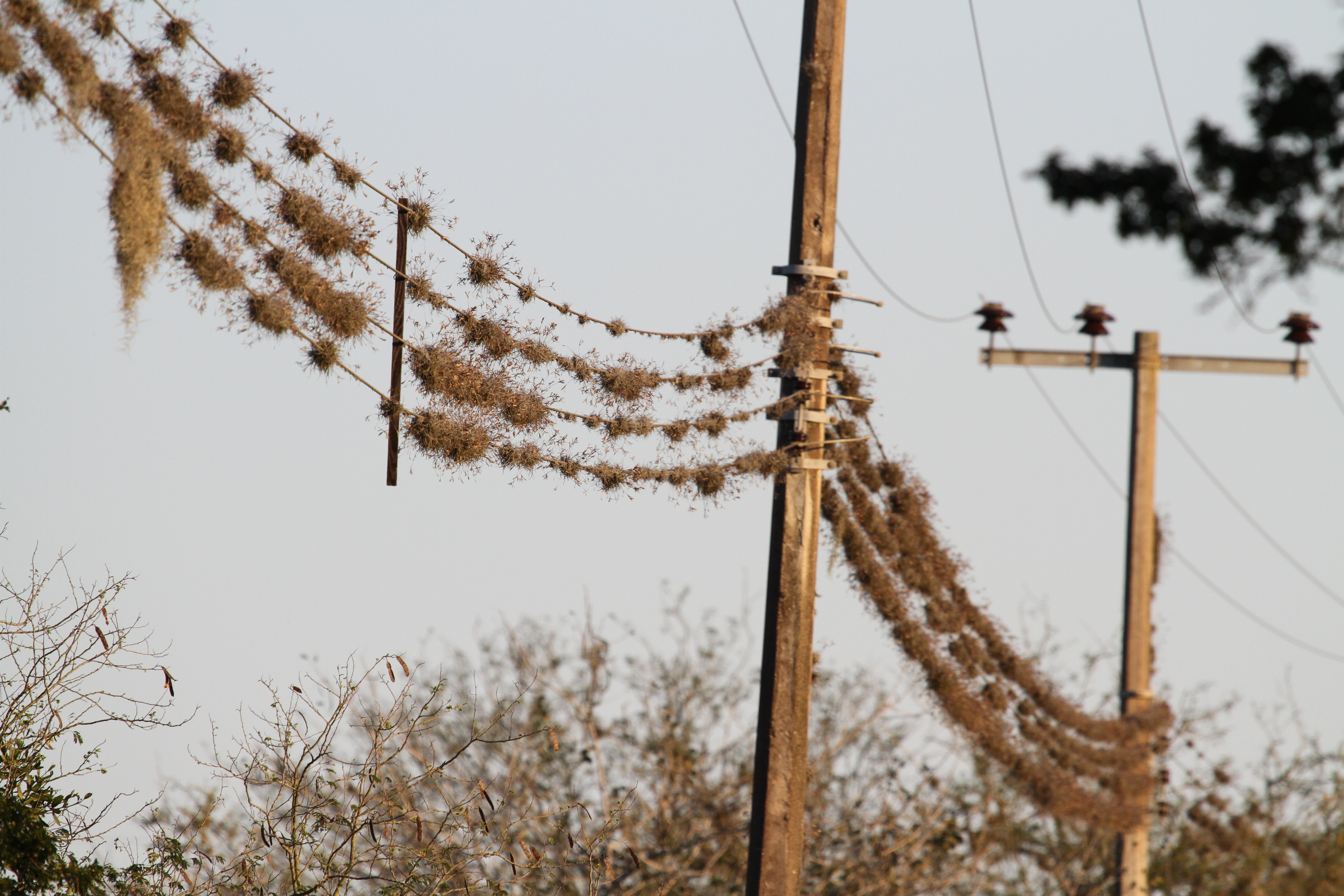 Heno o Paixtle Tillandsia recurvata on electricity cables, Tamaulipas, Mexico.